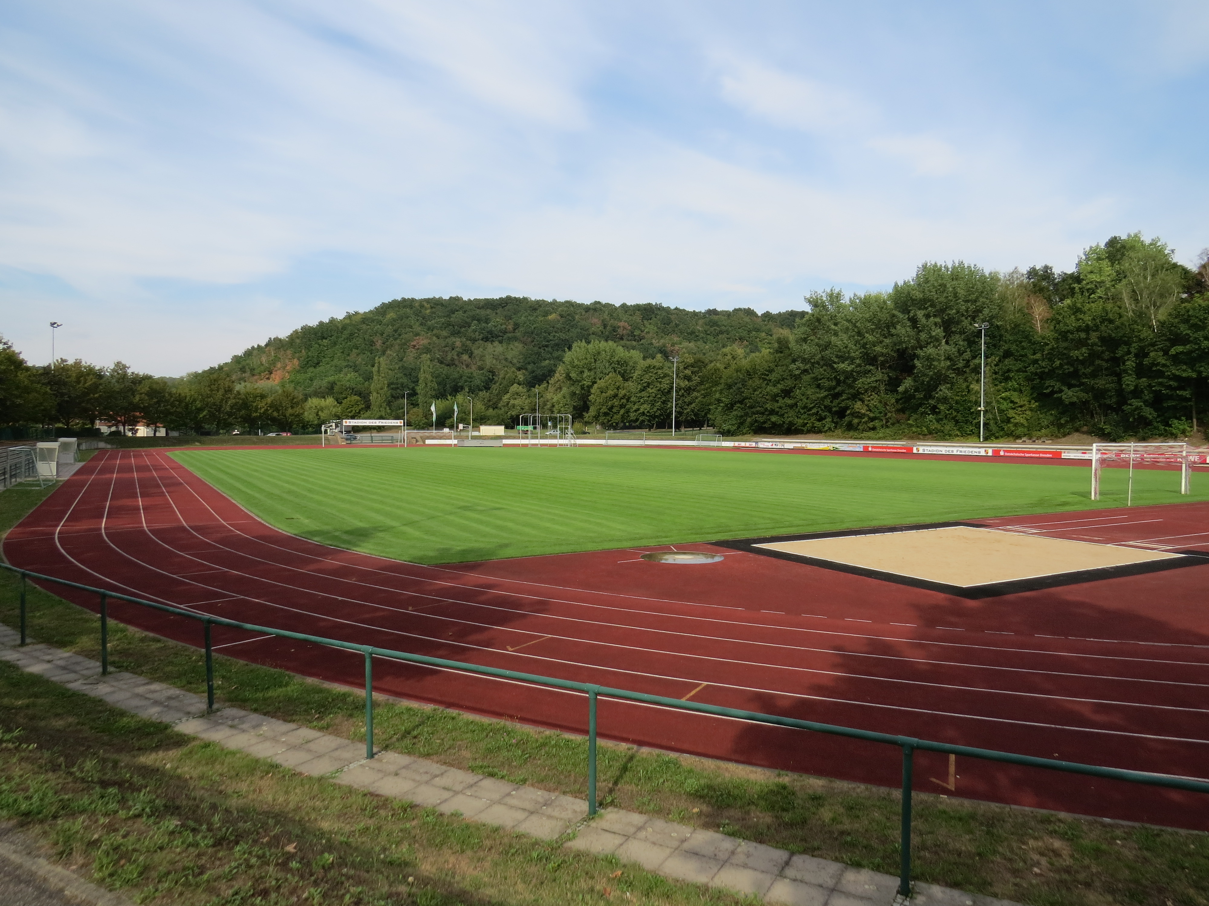 Blick über das Stadion des Friedens in Freital, im Hintergrund der Osterberg.